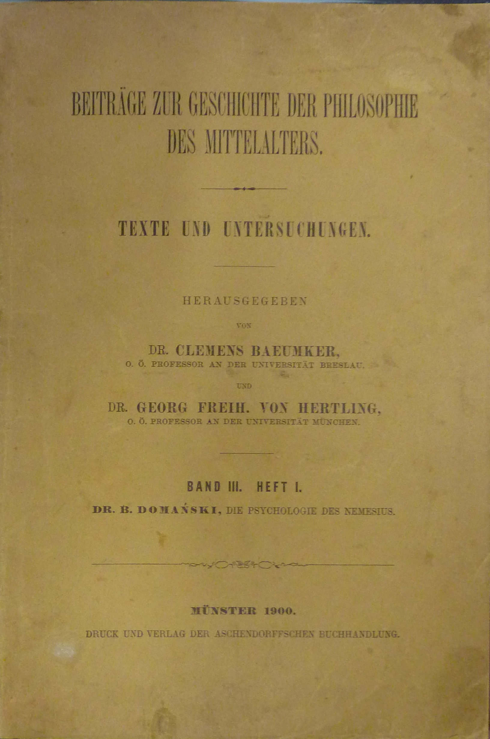 Karta tytułowa pracy doktorskiej ks. Bolesława Domańskiego